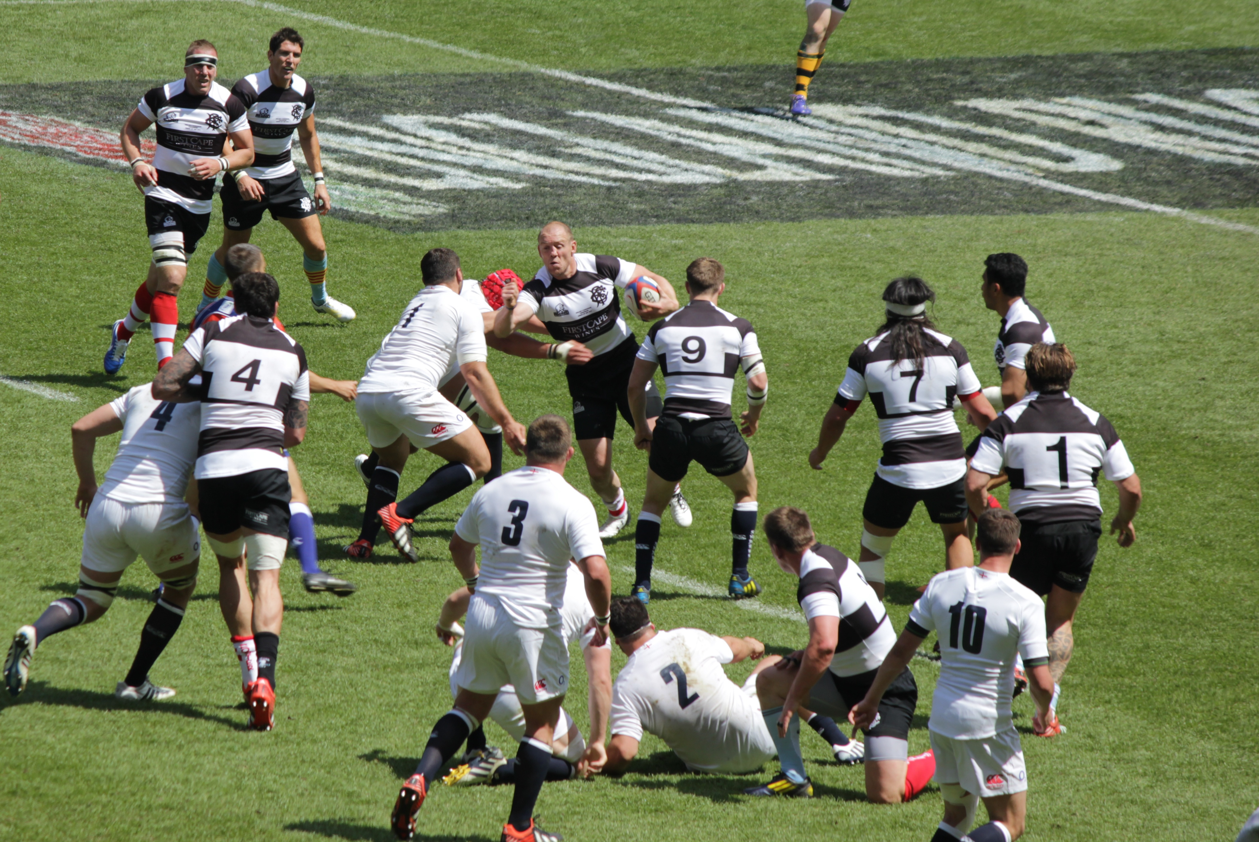 England v Barbarian 2013